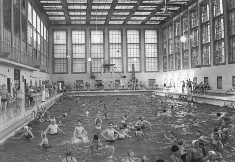 Illus Quaschinsky 14.3.1951 Im Stadtbad Mitte in Berlin. Das Stadtbad Mitte gehört zu den bekanntesten Hallenbädern Berlins. In diesem Bad, wo oft Schwimmwettkämpfe stattfinden, werden auch zu den Weltfestspielen der Jugend und Studenten Veranstaltungen abgehalten werden. UBz: Hochbetrieb in der großen Schwimmhalle.